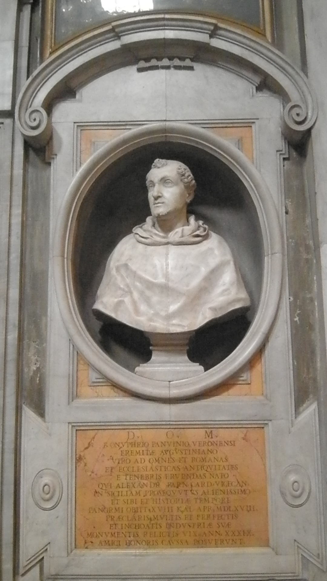 Roma, Basilica di Sant'Agostino in Campo Marzio: tomba di Onofrio Panvinio